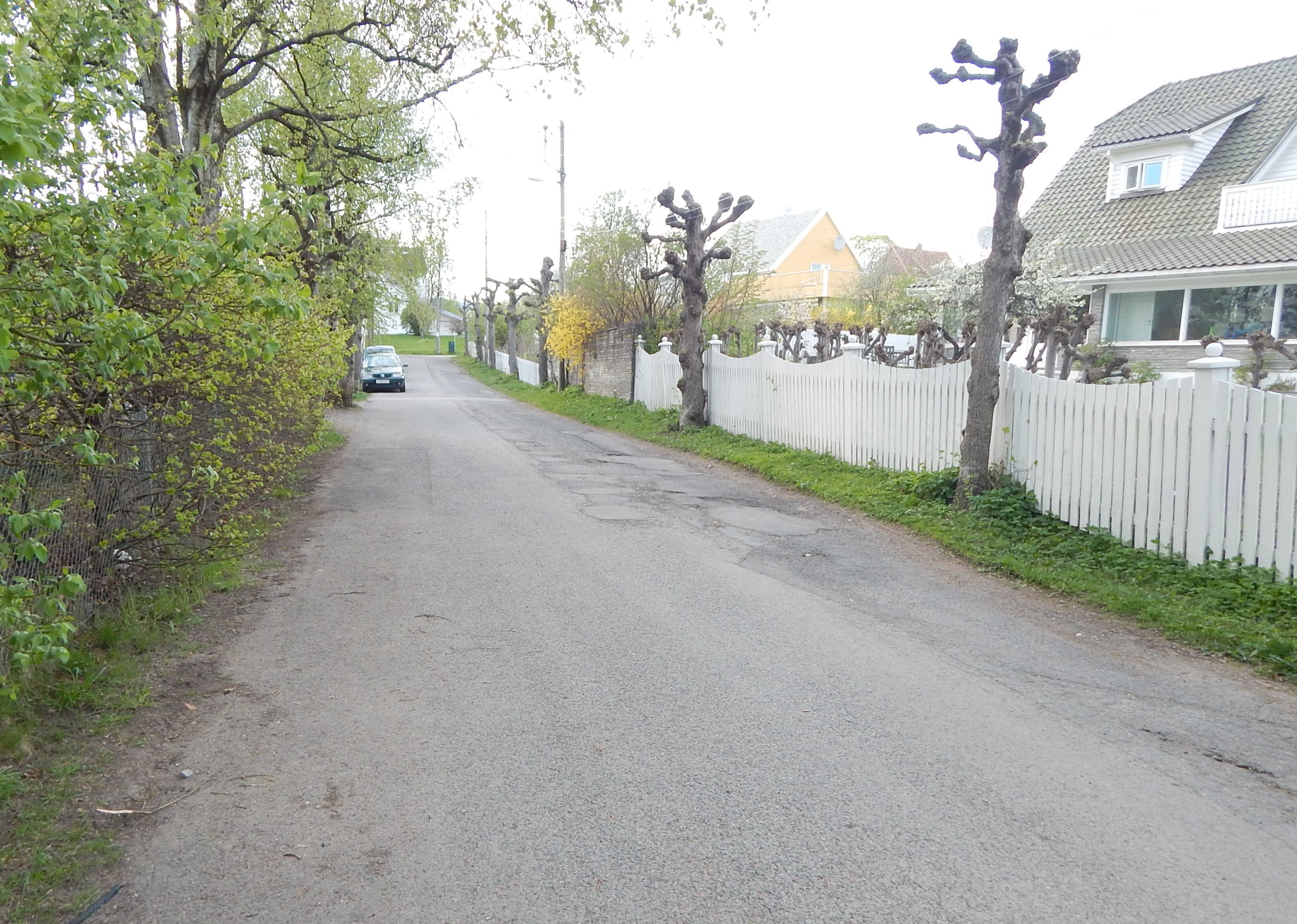 Nygårds allé